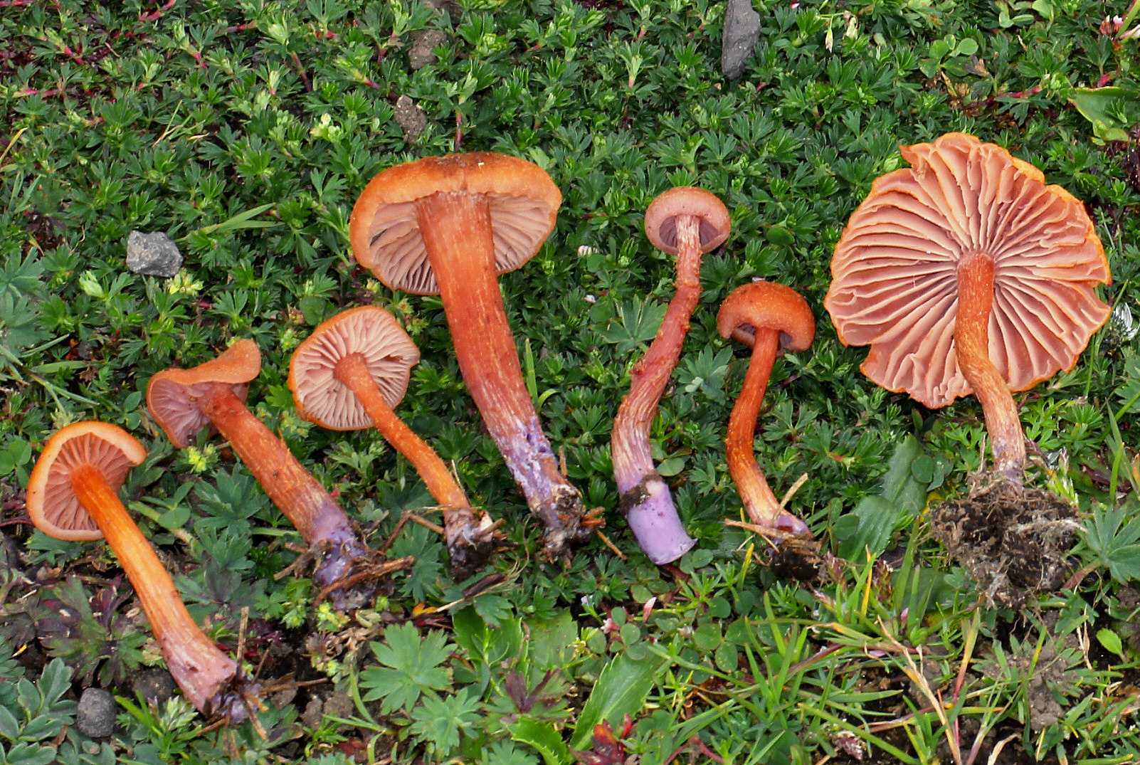 Laccaria bicolor (Maire) P.D. Orton